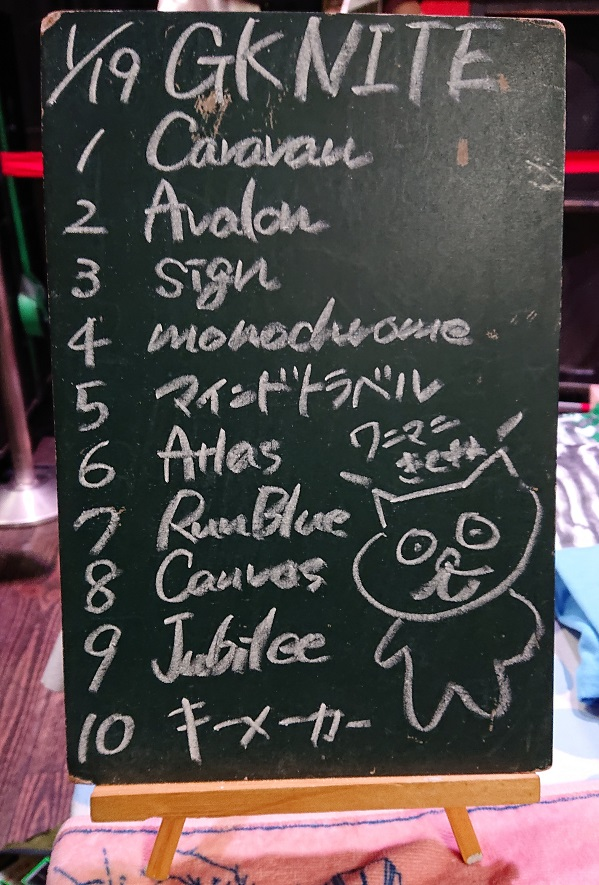 amiinAセトリボード(20190119(1))